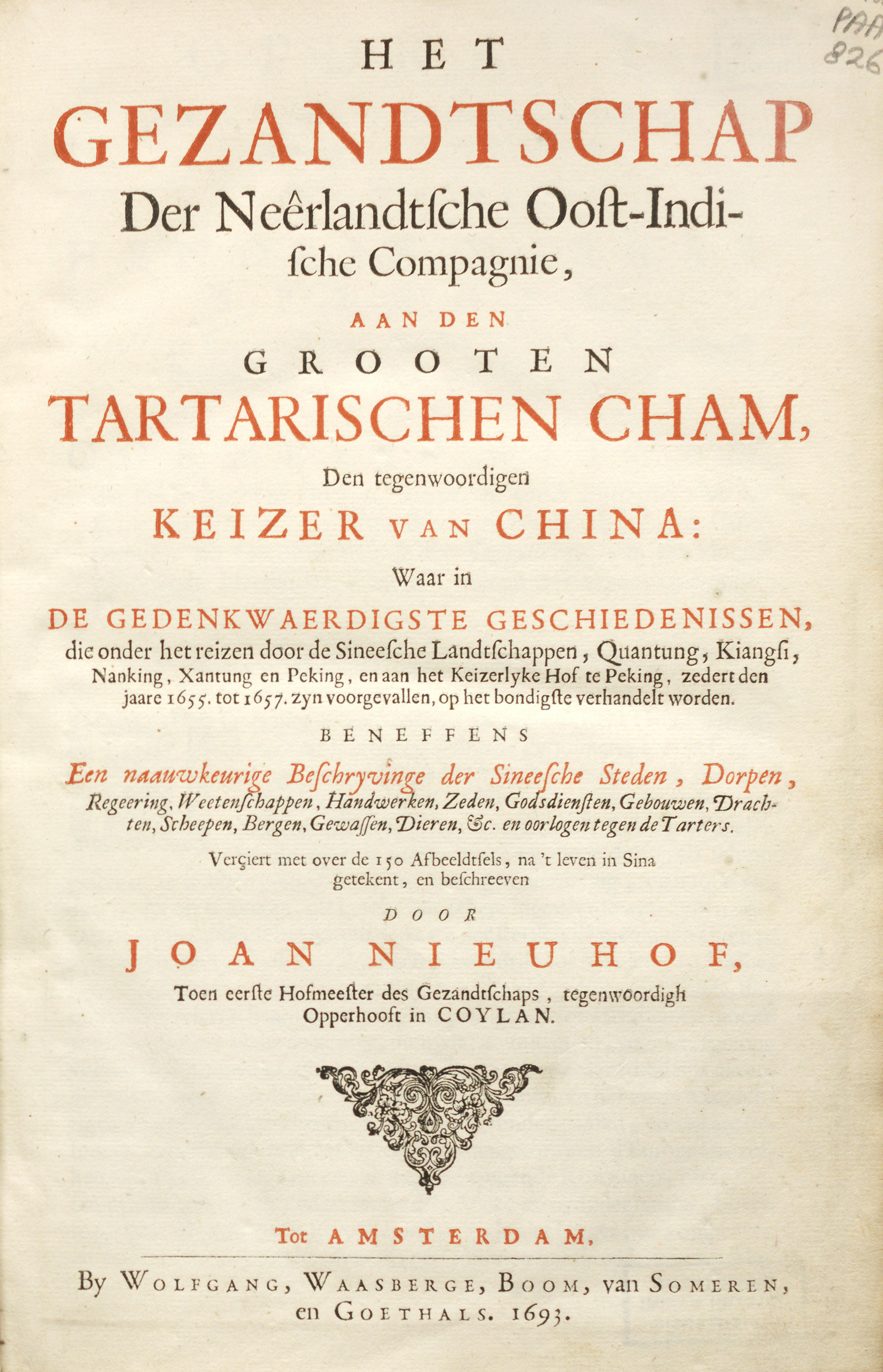 Joan Nieuhof: China (Original text: Joan Nieuhof: Gesandtschaft der Niederländisch-Indischen Kompanie an den Großen Tartarischen Khan, dem gegenwärtigen Kaiser von China) Andere Versionen: keine (für Public Domain)